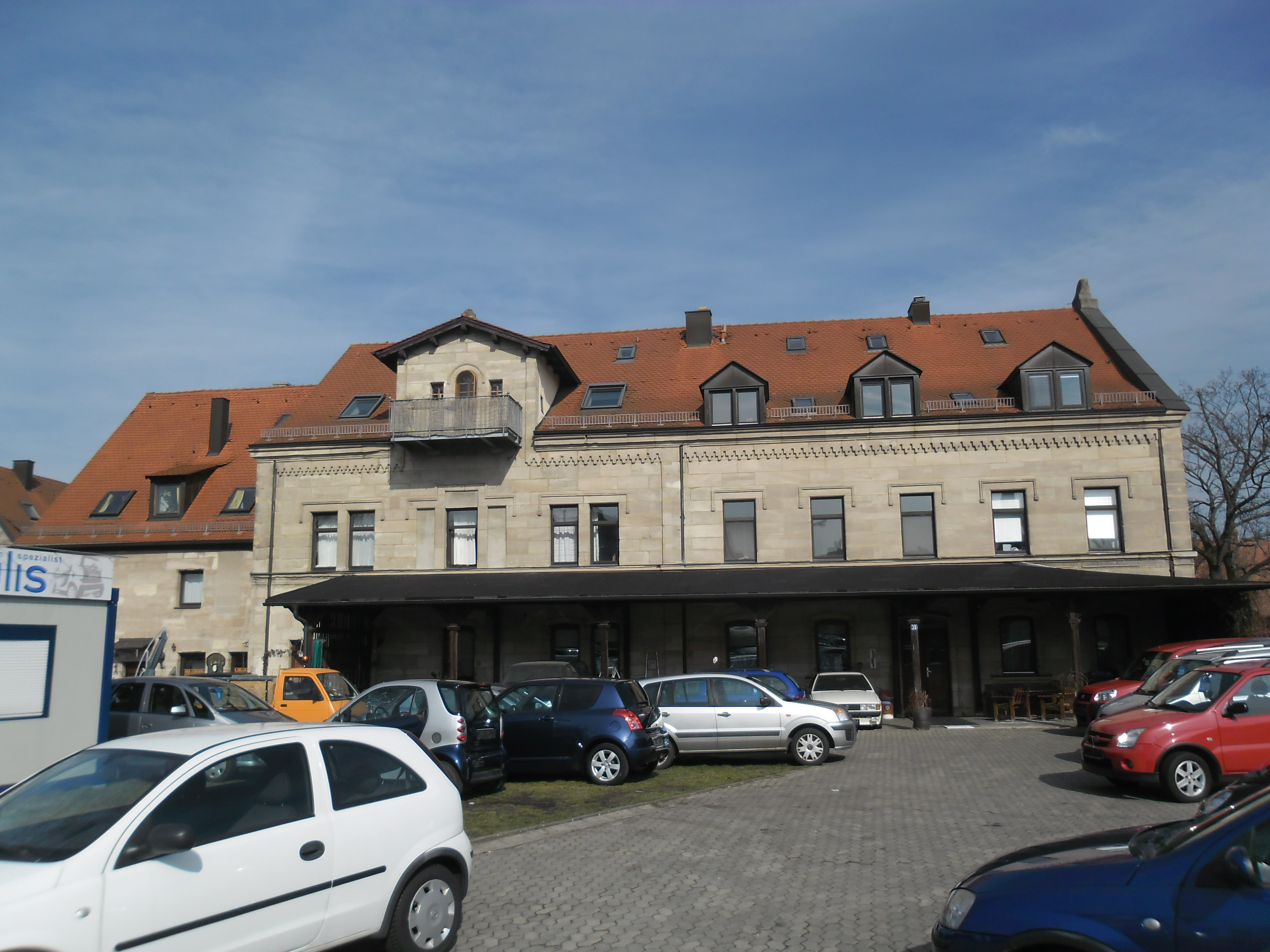 Adolf-Braun-Straße 35 03